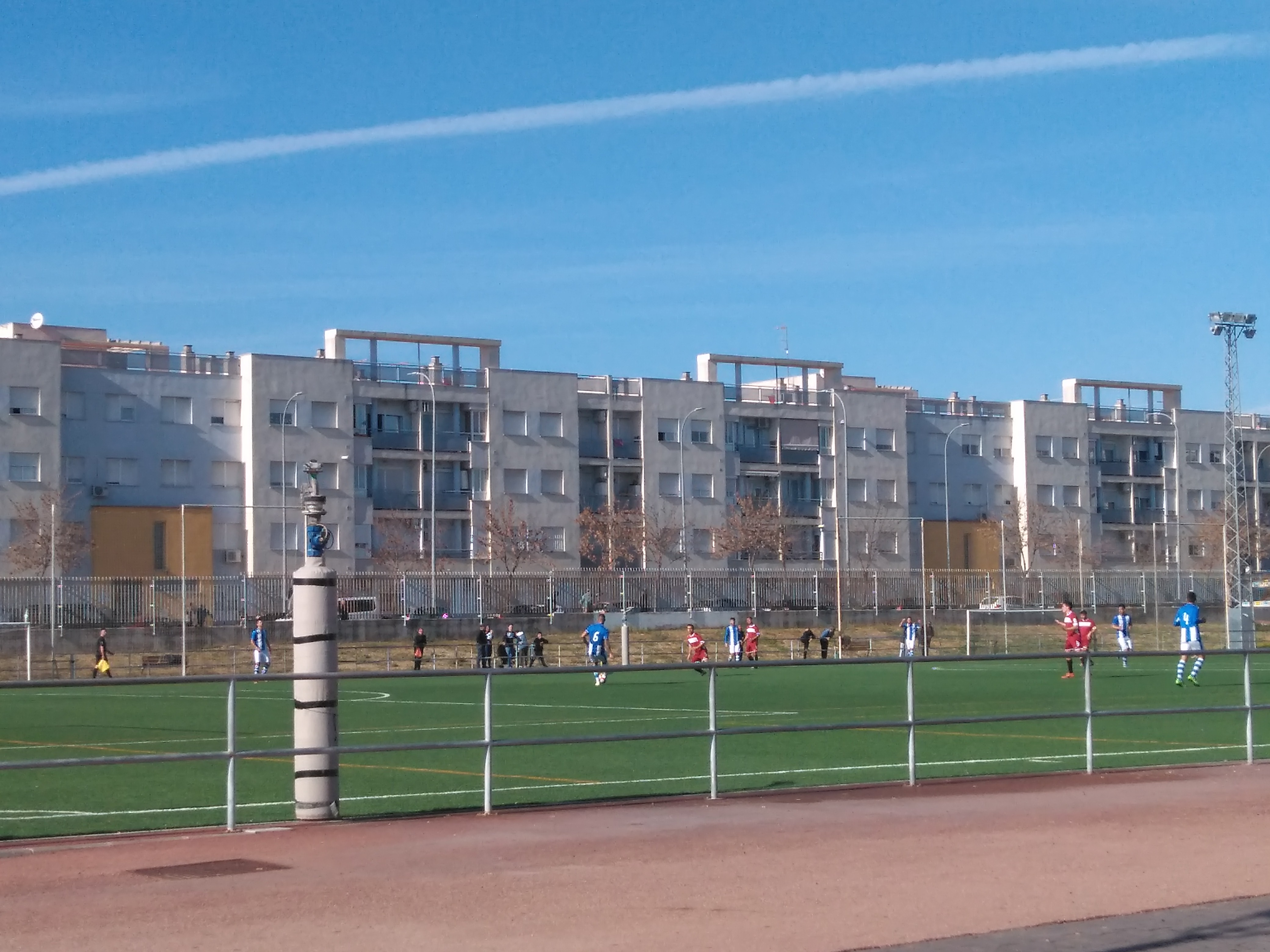 Partido entre Jerez Industrial y San Fernando en La Granja (Jerez de la Frontera, España)